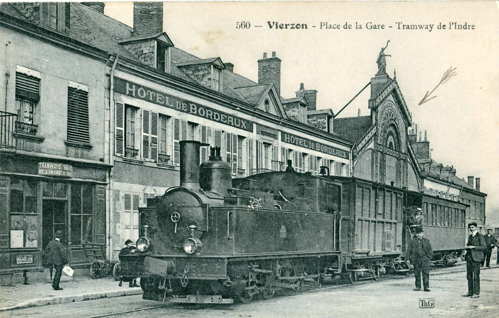 Carte postale ancienne éditée par Th. G, n°560 : VIERZON - Place de la Gare - Tramways de l'Indre